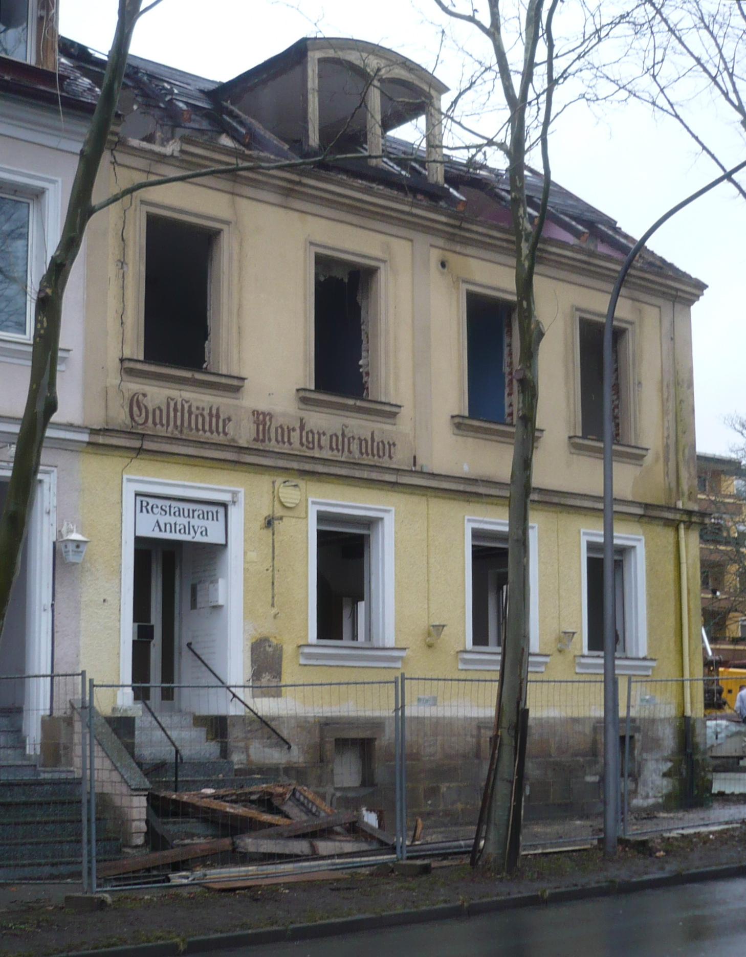 Abriss der Gaststätte Markgrafentor in Bayreuth